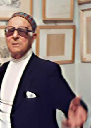 Ignazio Buttitta alla "Pro Loco" di Codogno (LO)